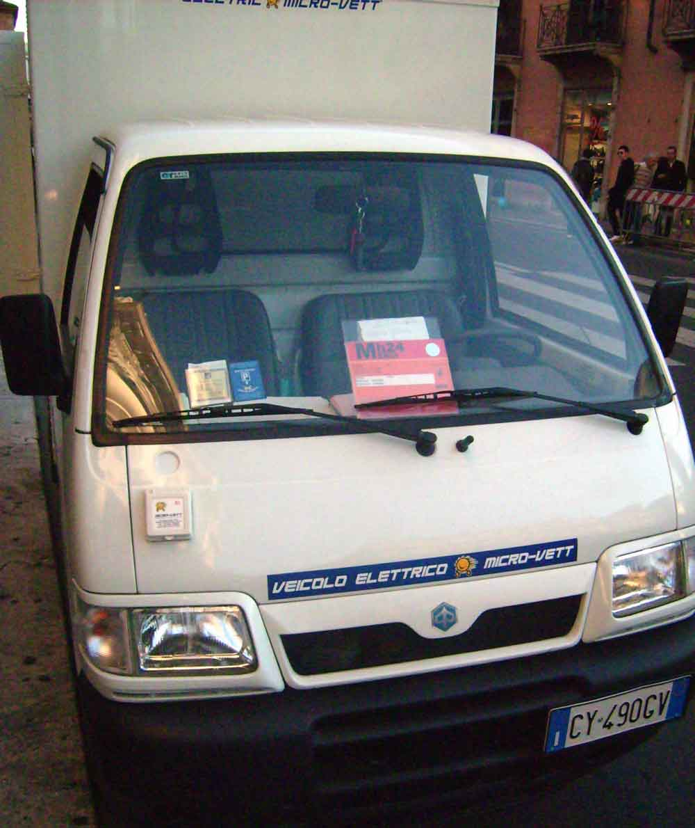 eigenes Bild 16.2.2007